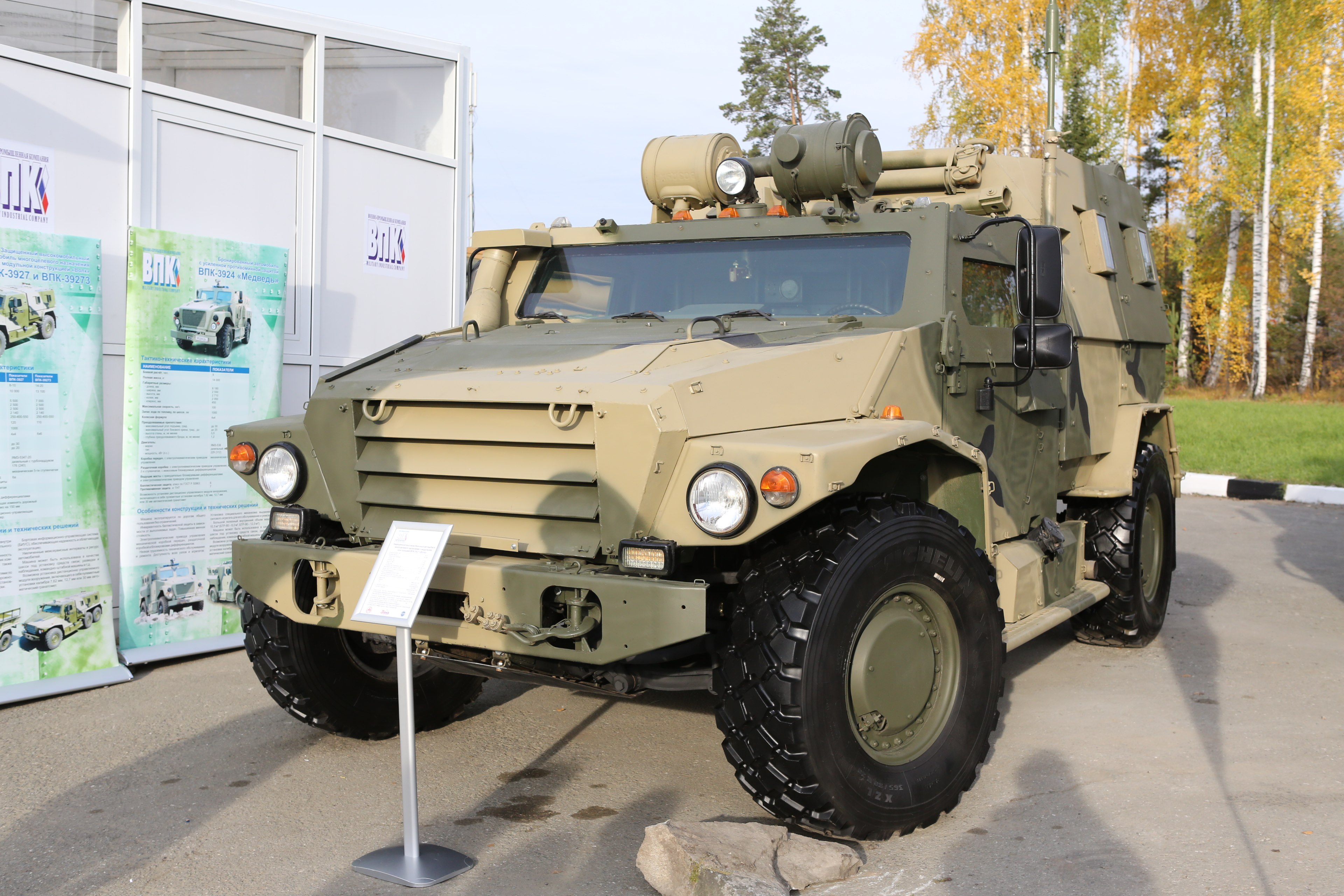 ВПК-3927 Волк с защищенным модулем управления и функциональным модулем для перевозки личного состава (VPK-3927 with protected cabin and separate armoured functional rear module)